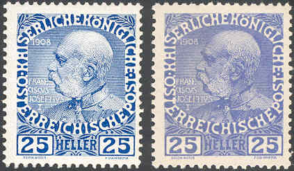 Unterschied zwischen Kreide- und Normalpapier Quelle: selbst fotografiert